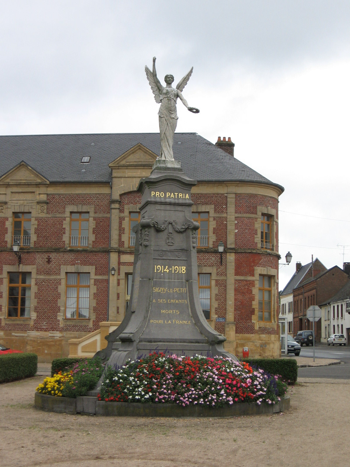 Monument aux morts de Signy-le-Petit